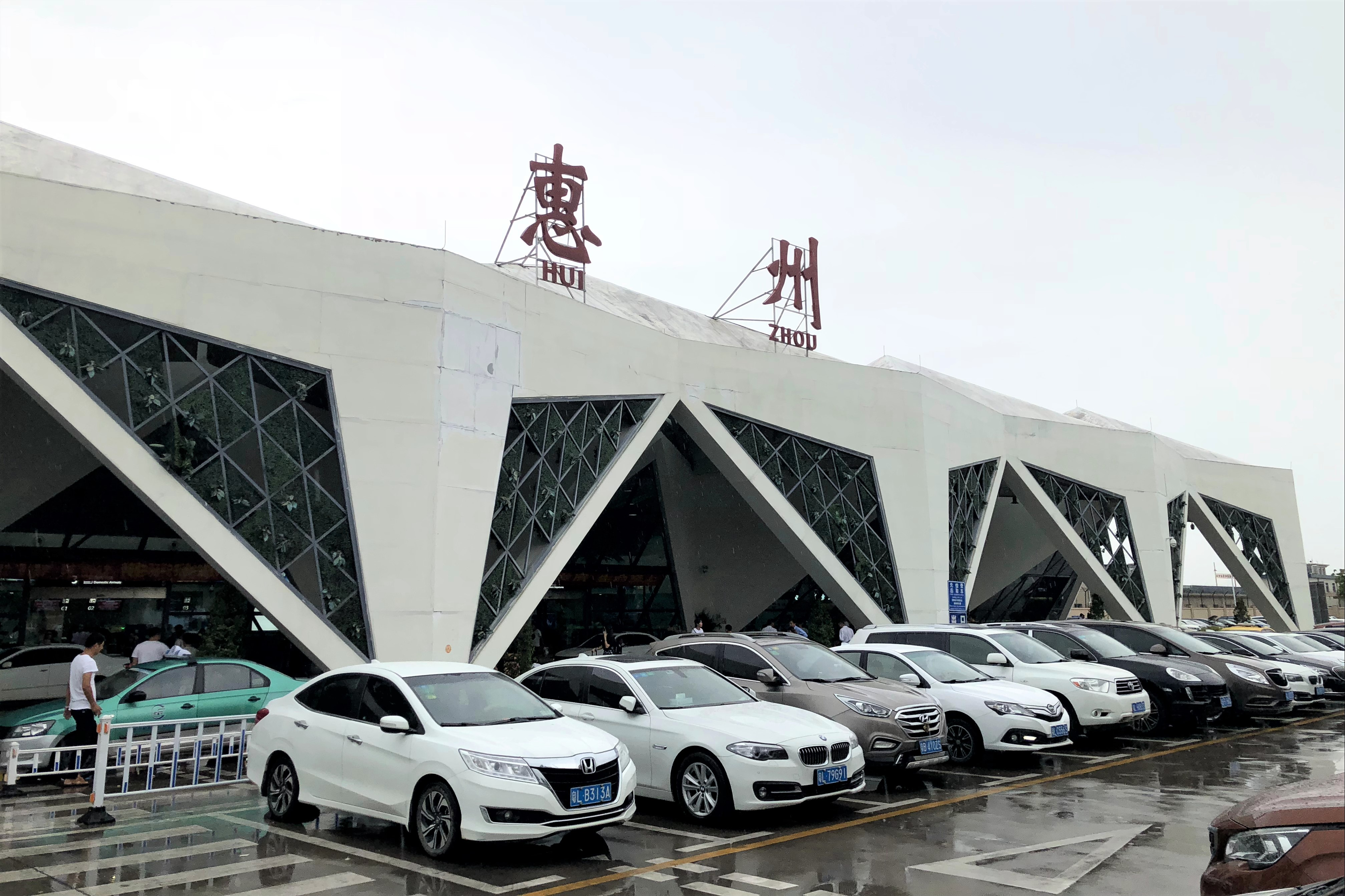 中文（中国大陆）: 惠州机场 外景